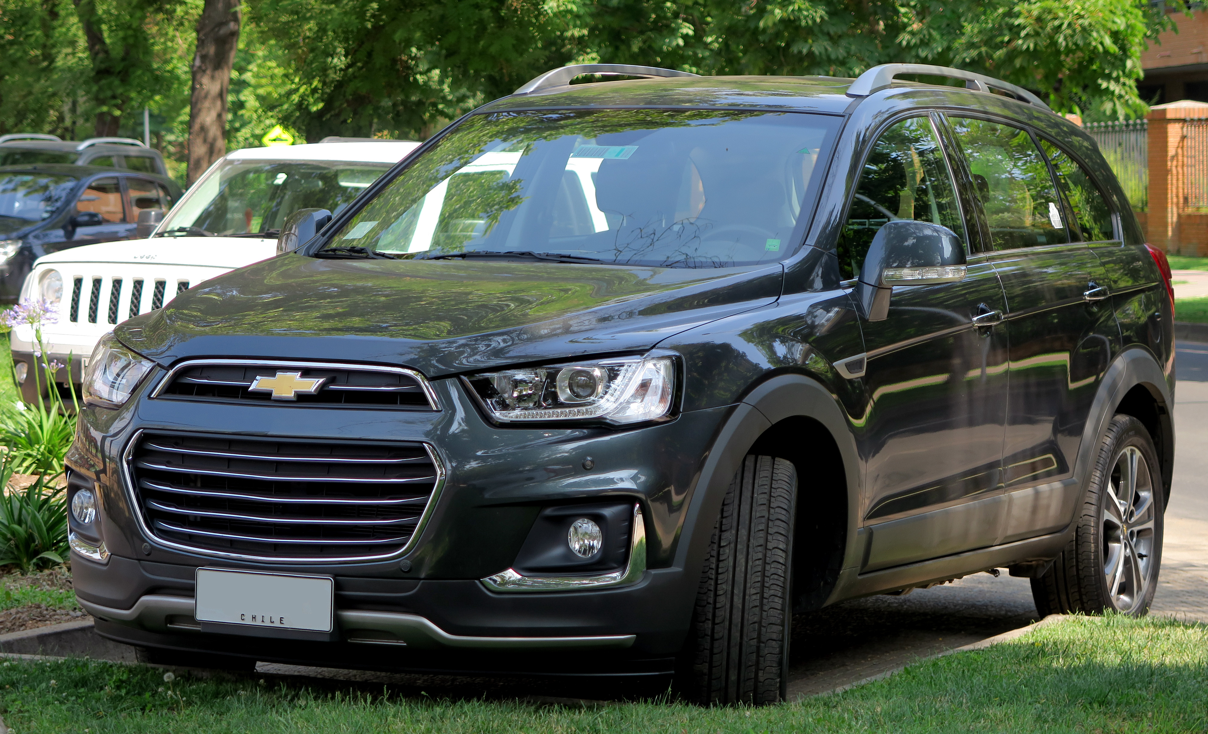 Chevrolet Captiva 2.2d LTZ AWD 2018